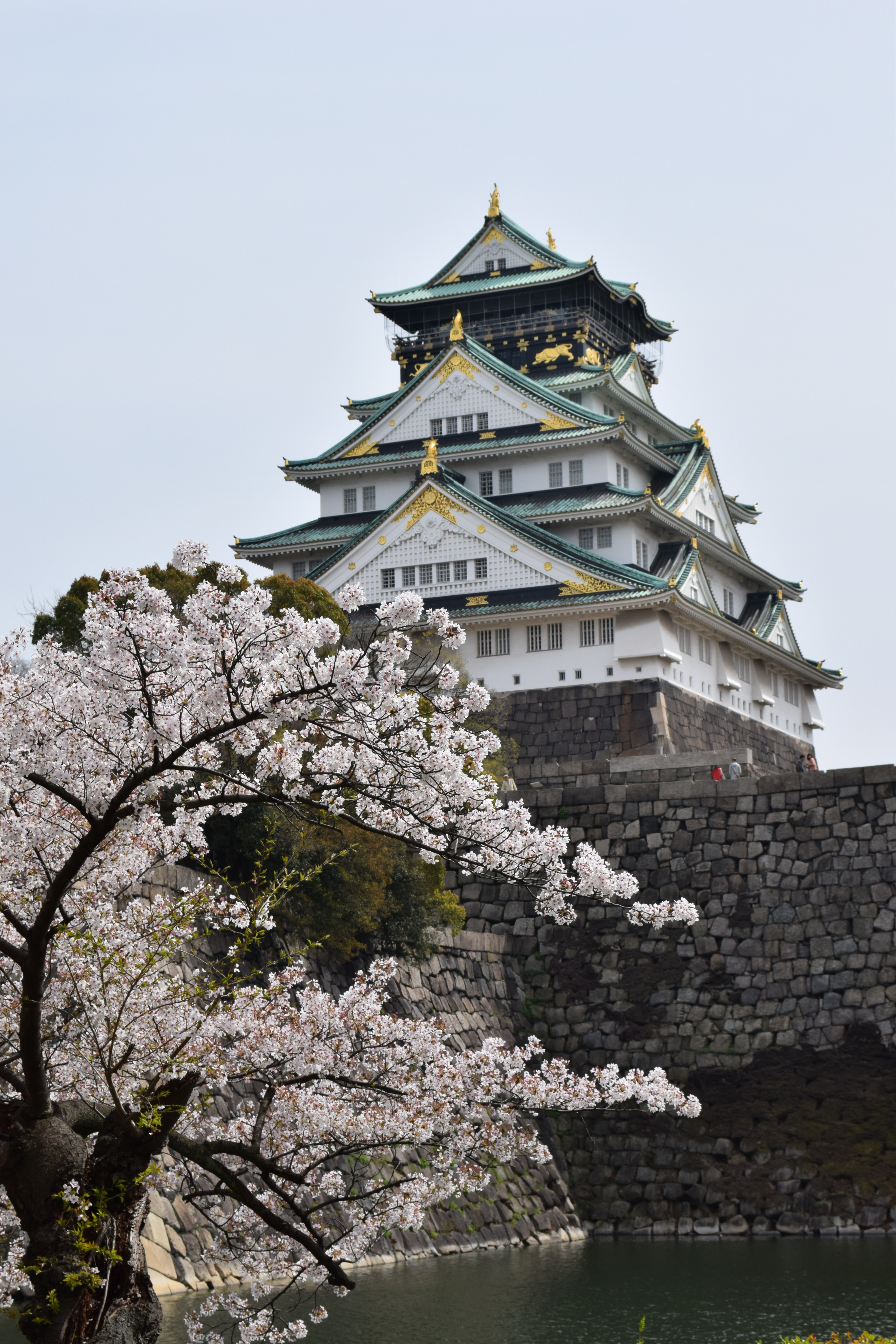 Osaka Castle (Osakajo)